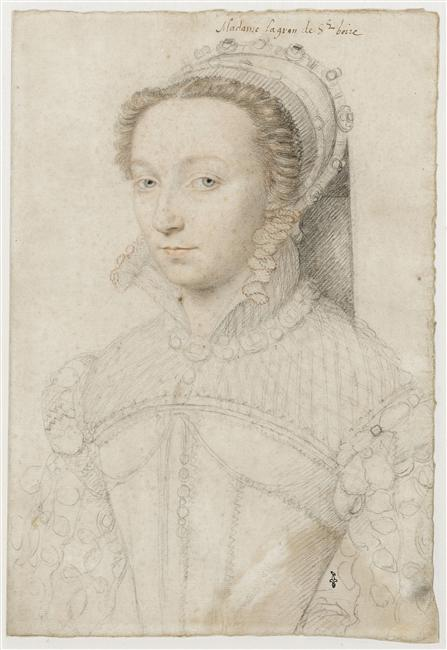 Marie de Gaignon (1530-1565)